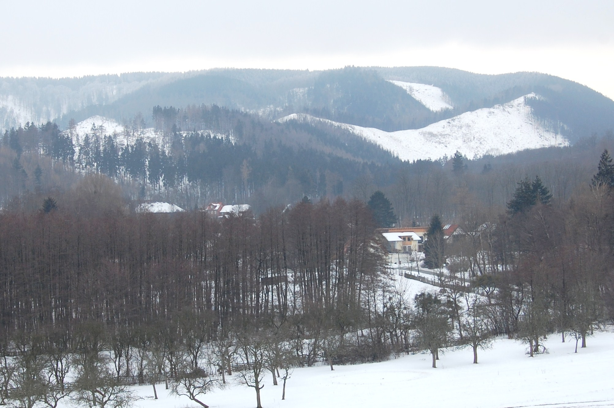 Blick vom Karrberg auf das winterliche Öhrenfeld